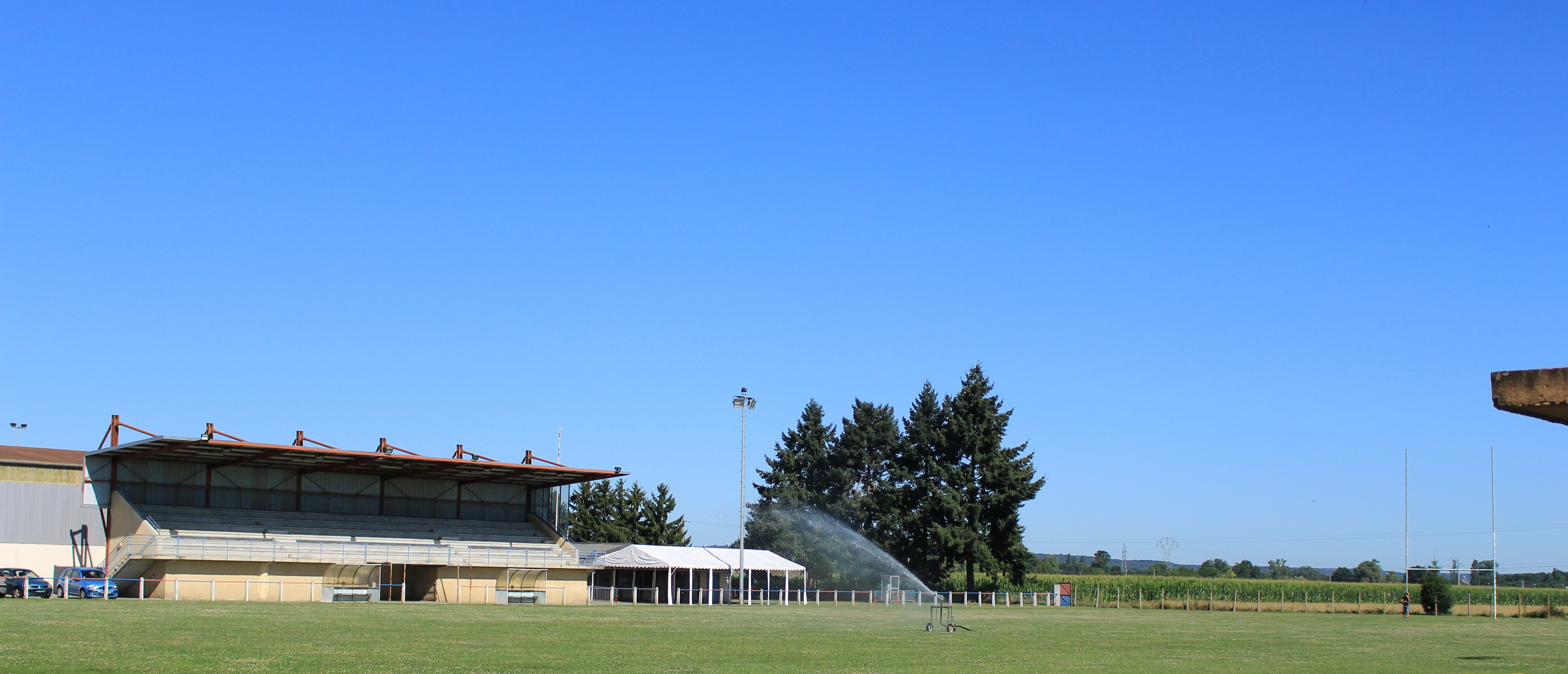 Stade de rugby de Bazet (Hautes-Pyrénées)